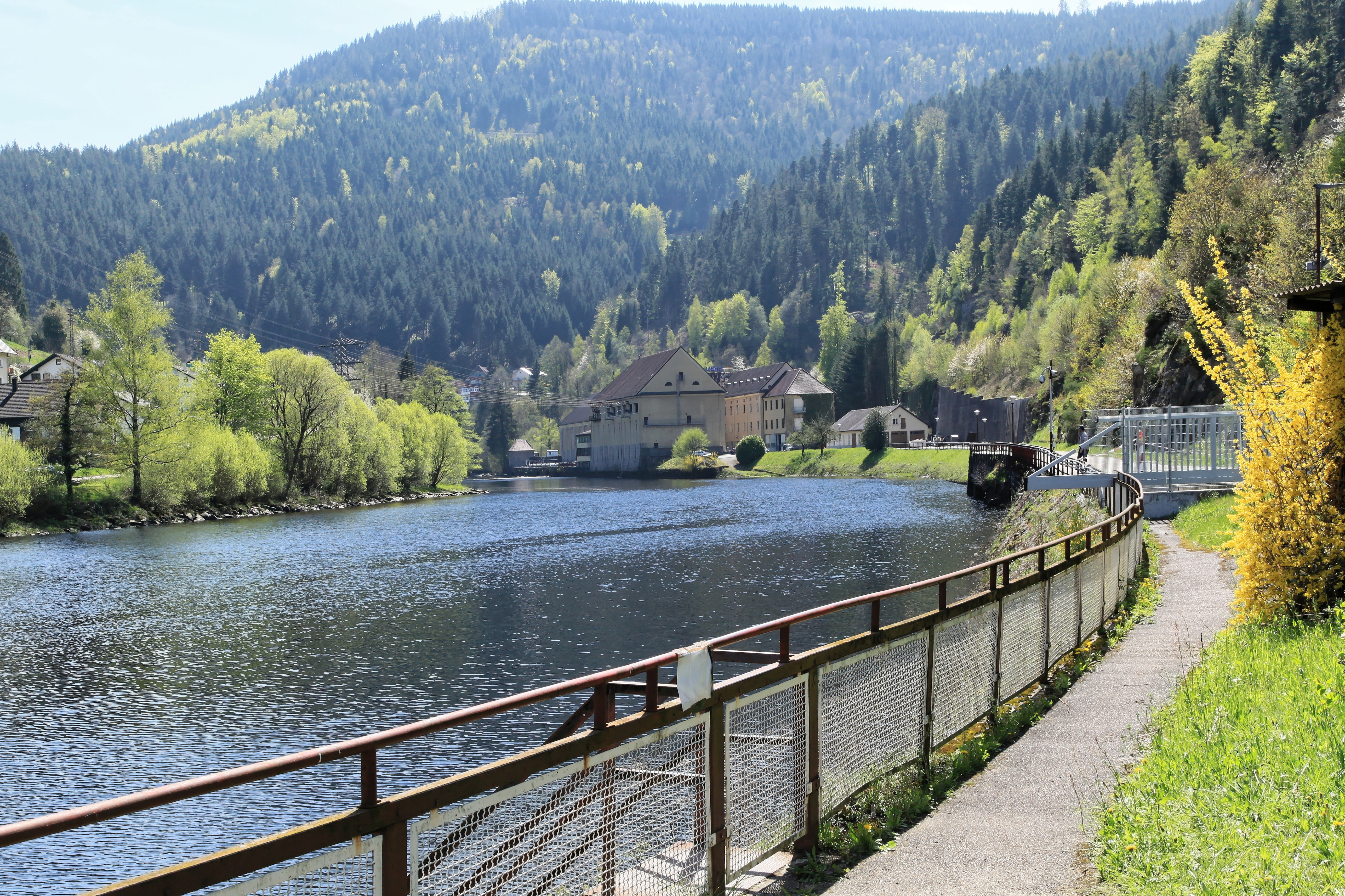 Ausgleichsbecken und Niederdruckwerk, Eckstraße in Forbach (Baden)